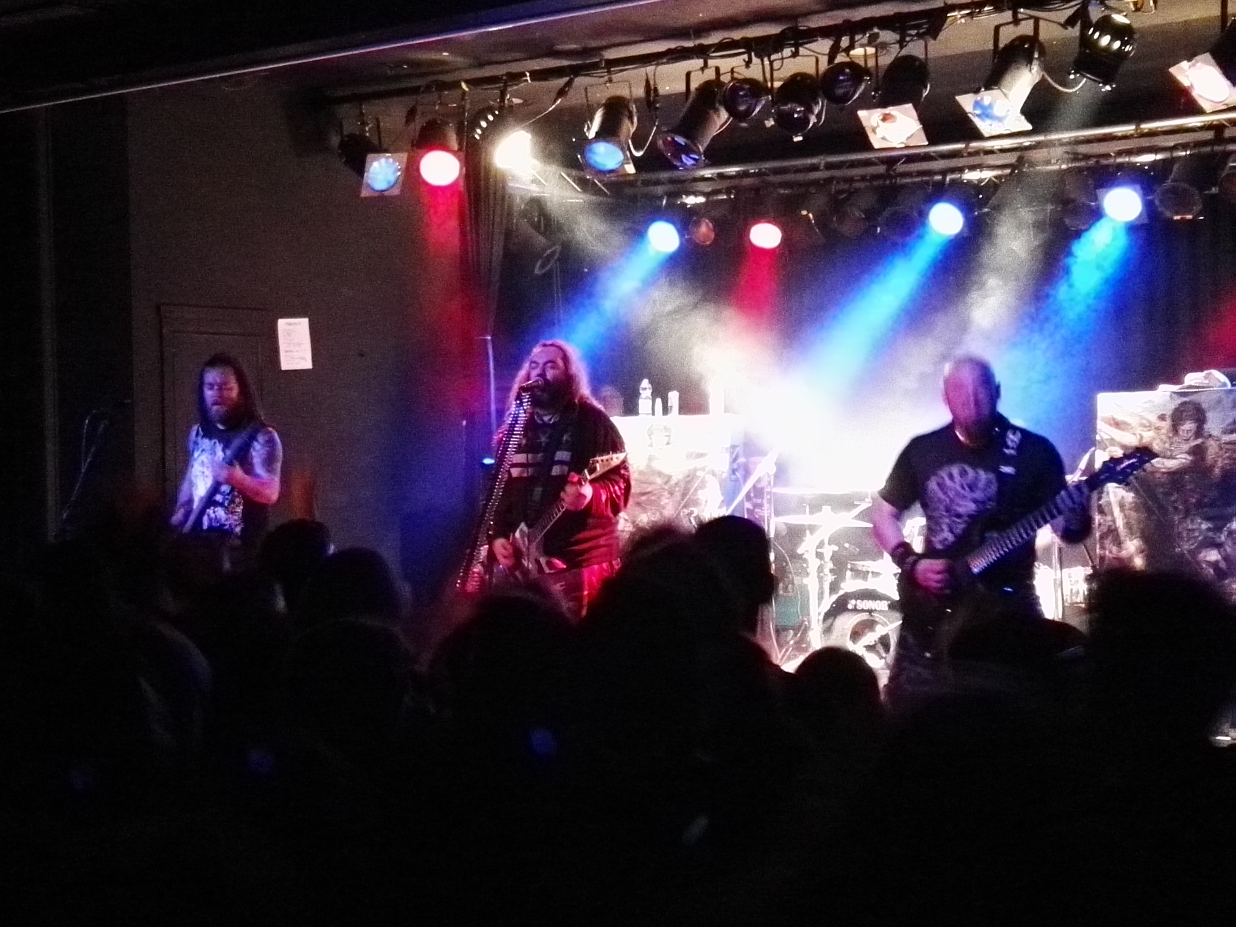 Soulfly in der Scheune in Dresden